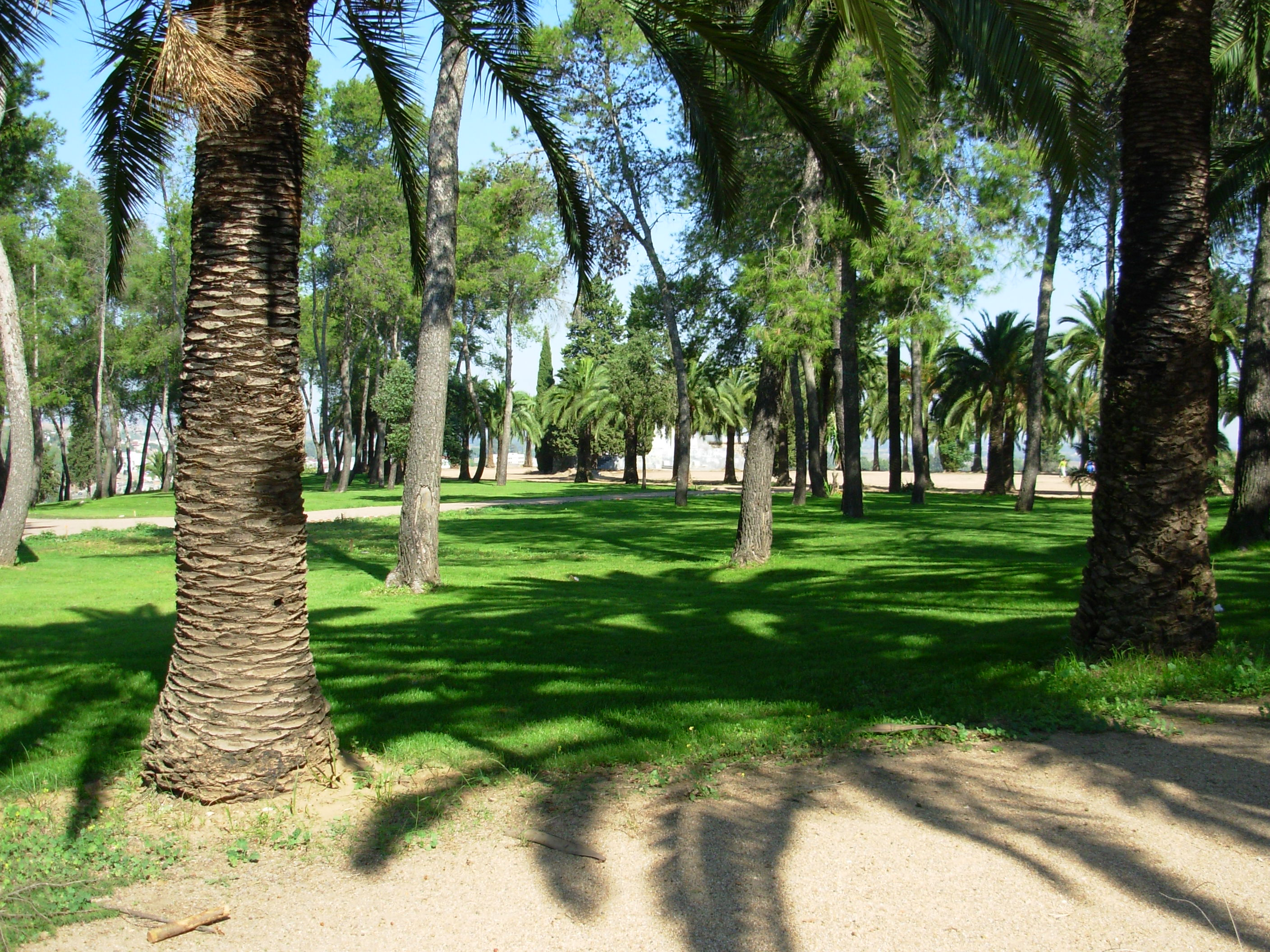 Parque de la Alcazaba de Badajoz